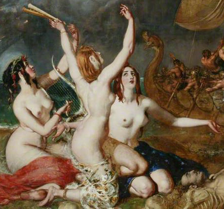 detail